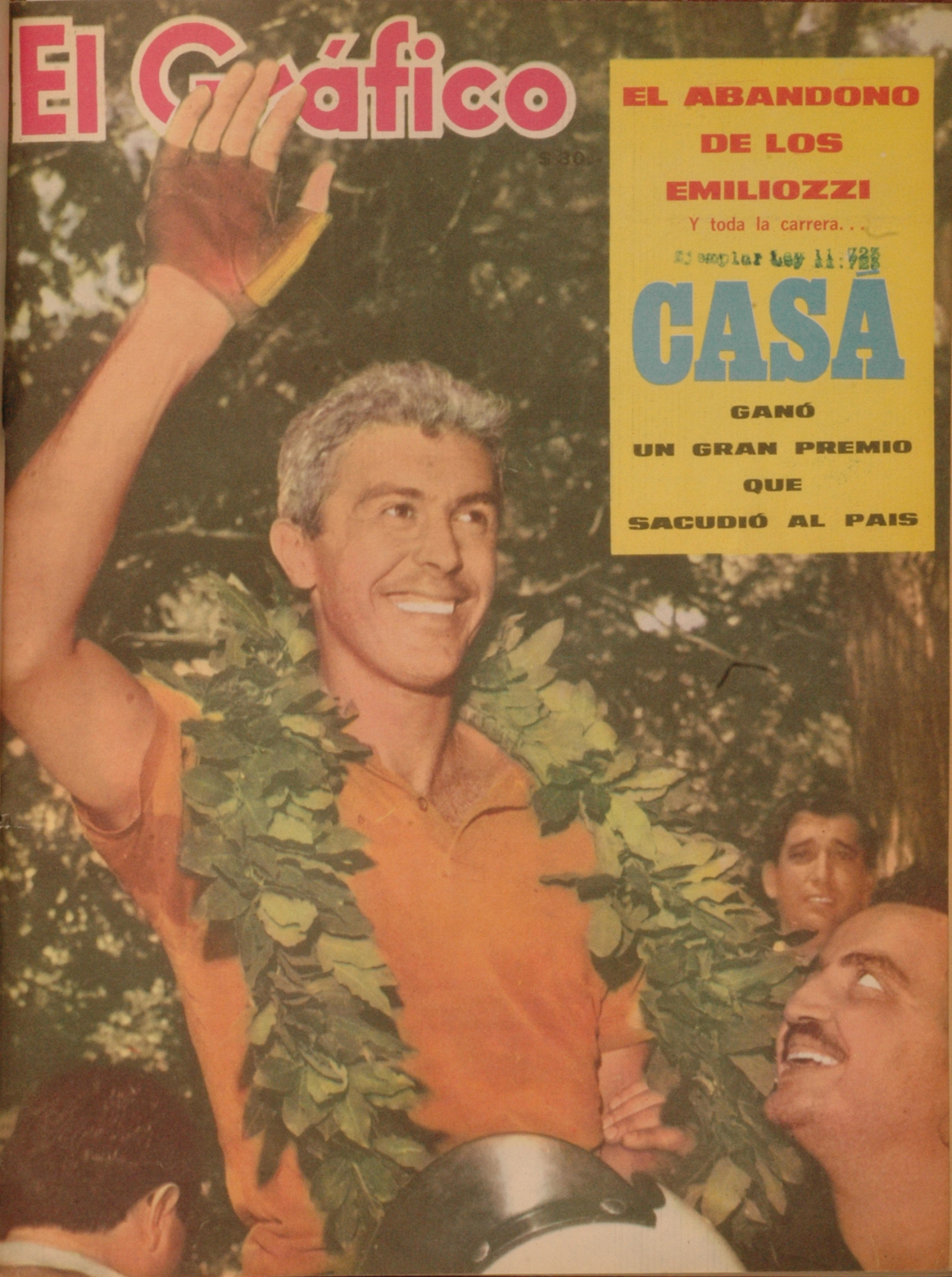 El Grafico del 07 de Diciembre de 1965. Edicion 2409